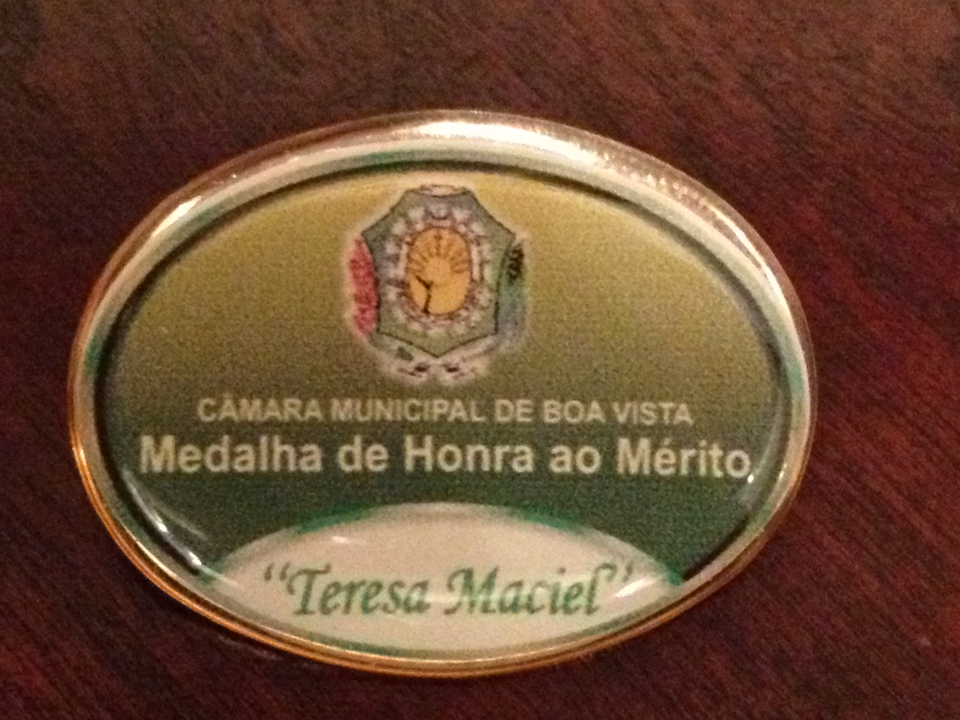 Medalha de Honra ao Mérito "Teresa Maciel", concedido pela Câmara Municipal de Boa Vista - Roraima.